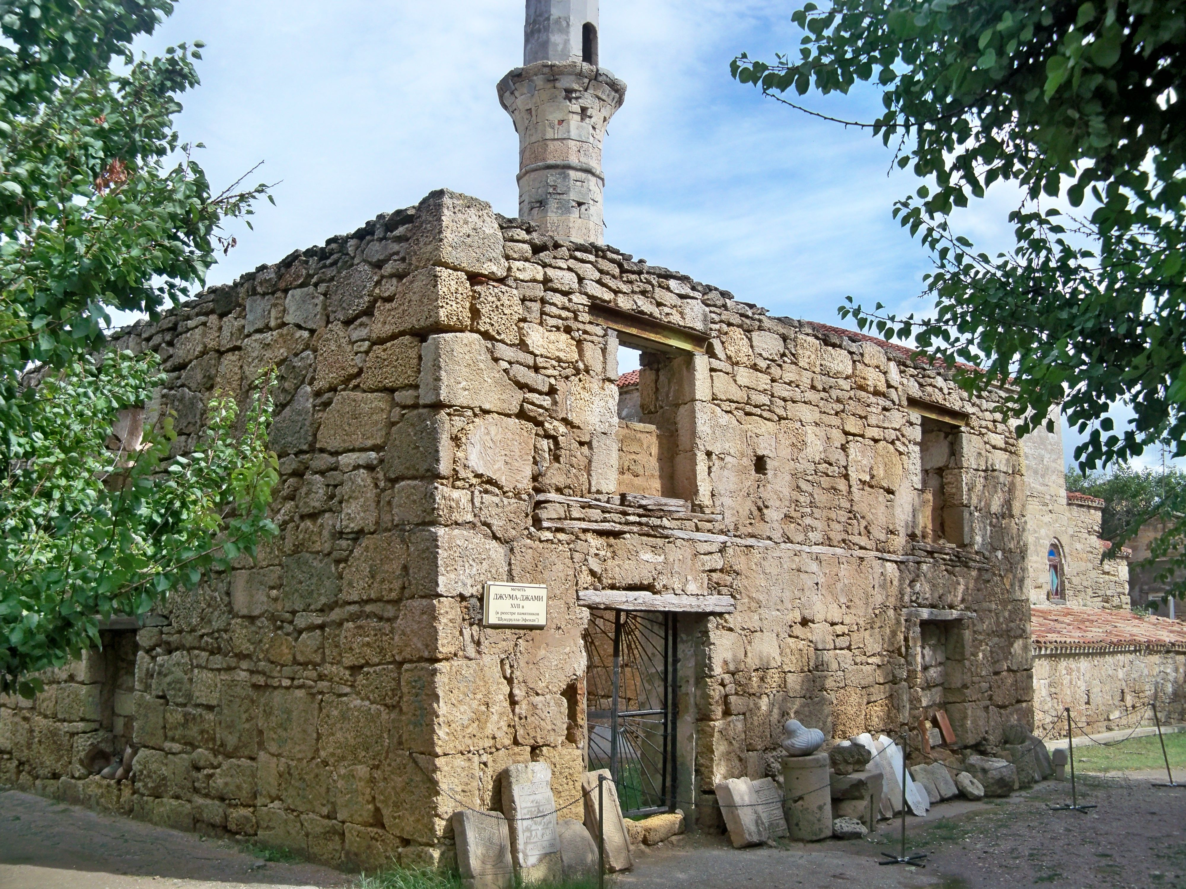 Мечеть Шукурла-Ефенді, Євпаторія, вул. Караєва, 18 (вул. Інтернаціональна, 34–36)